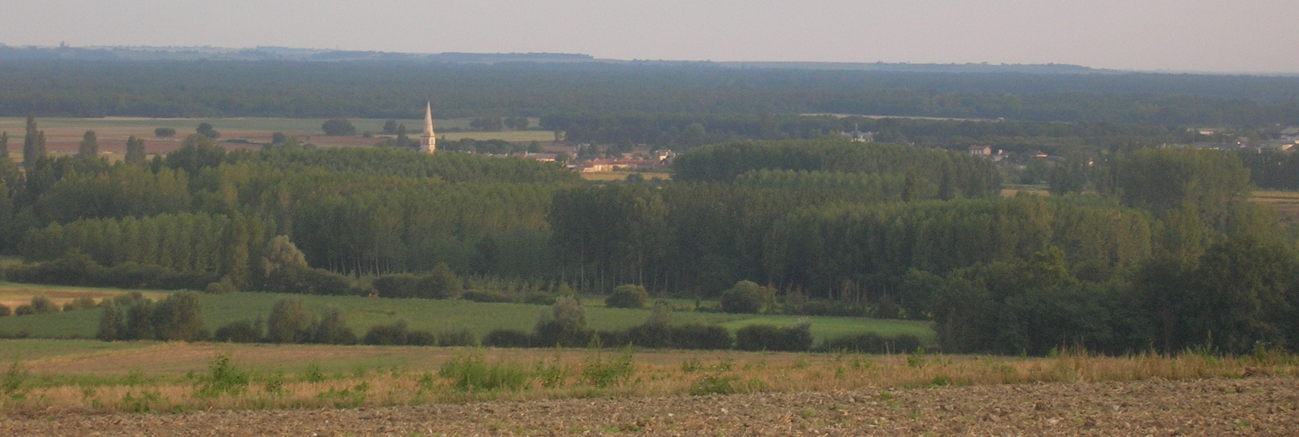 Landscape